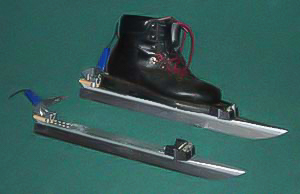 Foto: Krister Valtonen Datum: 2006-12-18